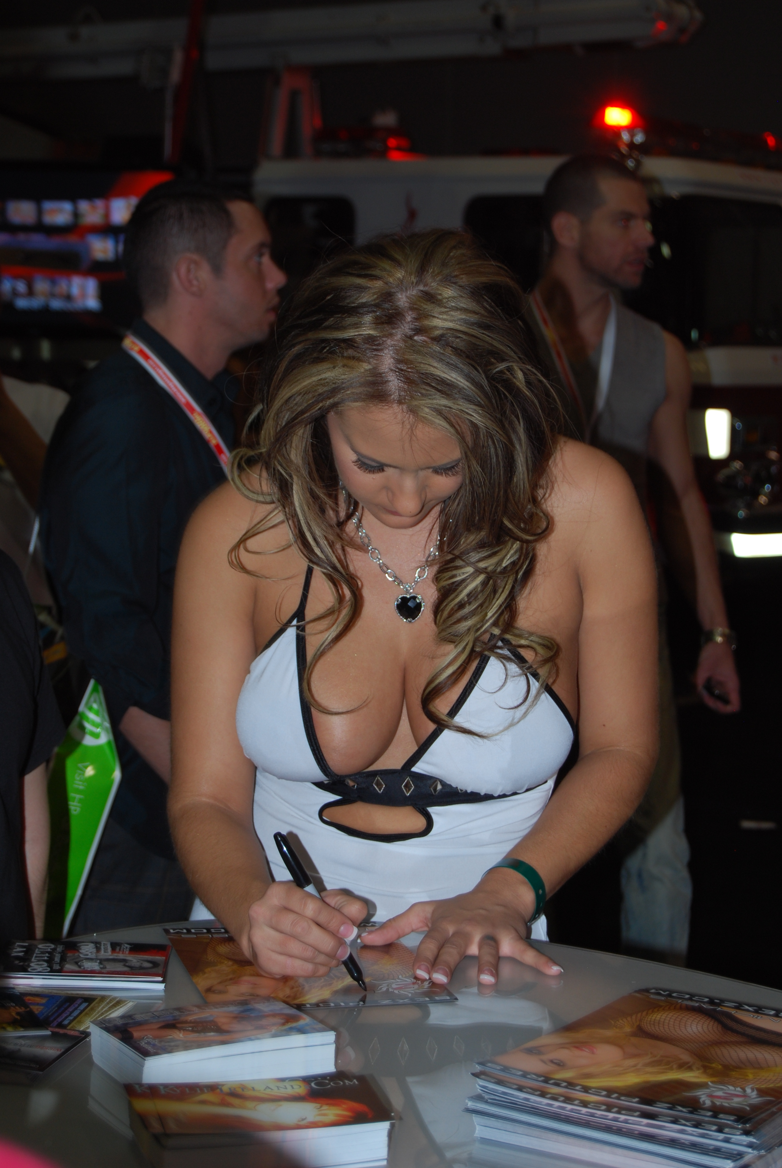 AEE2008_Nikon_Day1 262